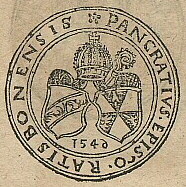 Ausschnitt aus dem Blatt: Münzrückseite mit dem fürstbischöflichen Wappen des Regensburger Bischofs Pankraz von Sinzenhofen